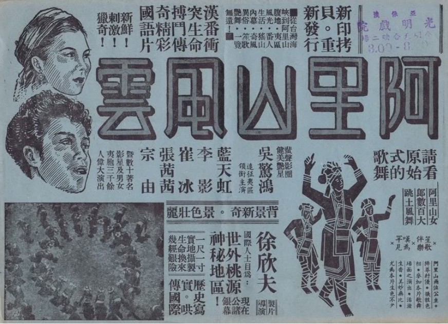 如圖片所示。